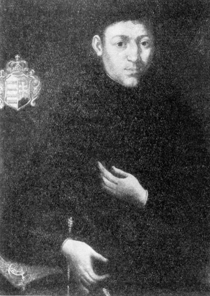 Lazar Schopper, v roce 1723 sestoupil jako první na dno Macochy (první doložený pokus). Později se stal provinciálem řádu Minoritů.